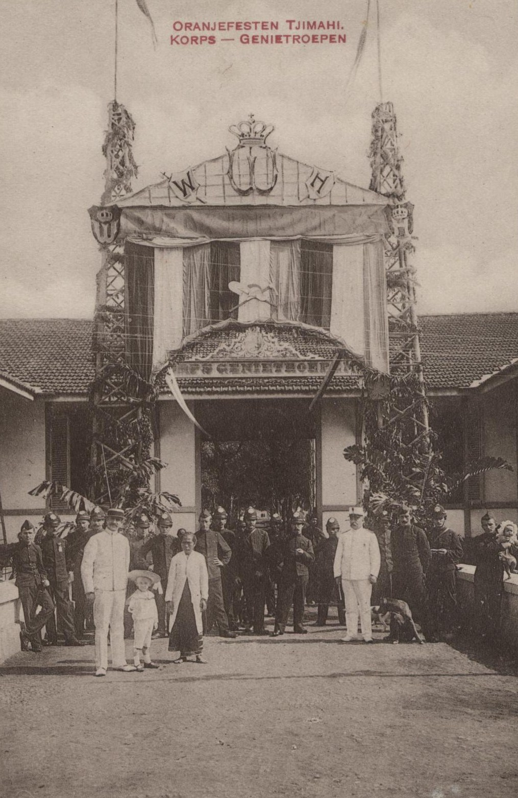 Oranjefeesten bij het Korps Genietroepen te Tjimahi, ca. 1905.